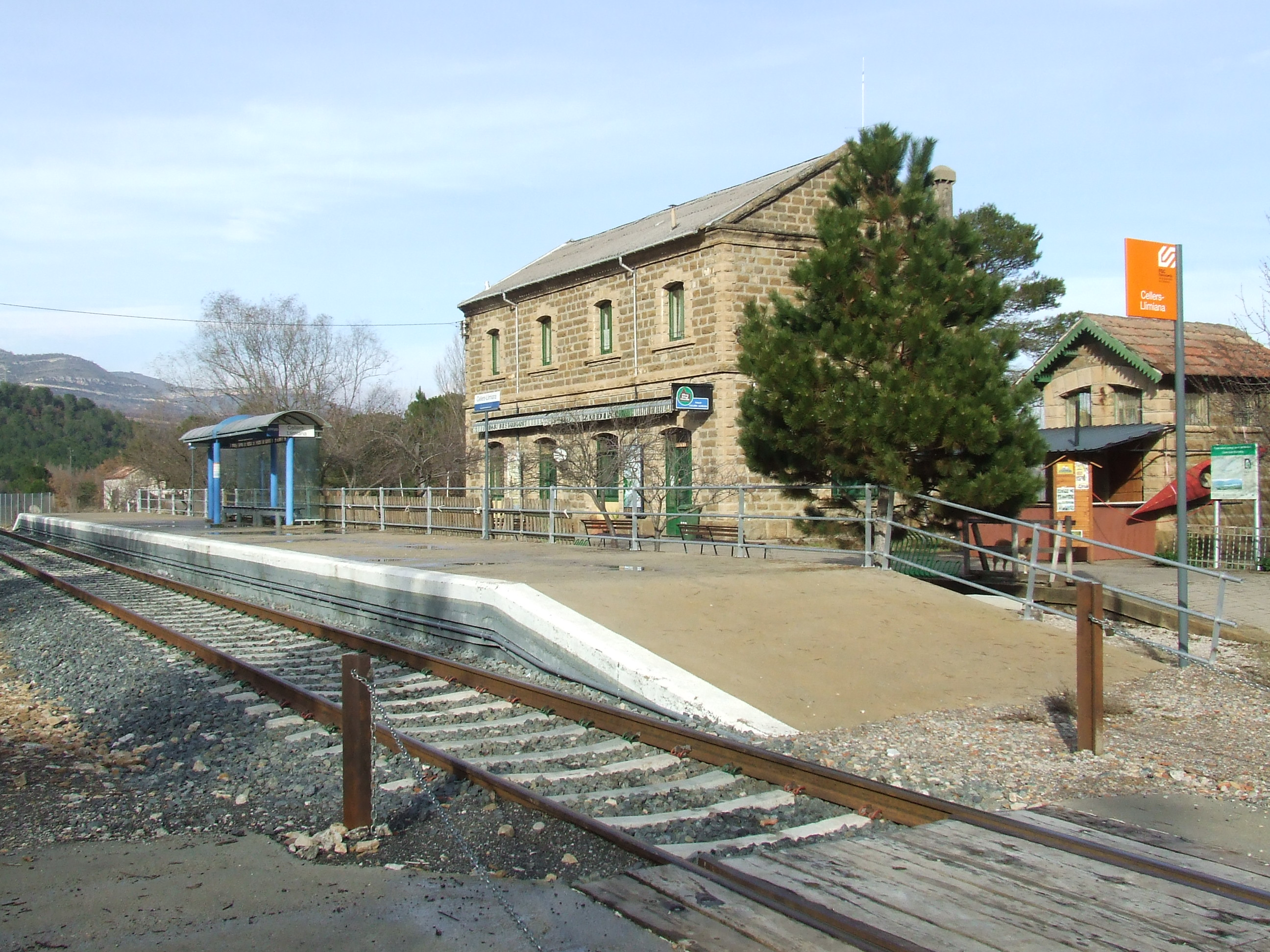 Estació de Cellers-Llimiana (Cellers, Guàrdia de Tremp, Castell de Mur, Pallars Jussà)